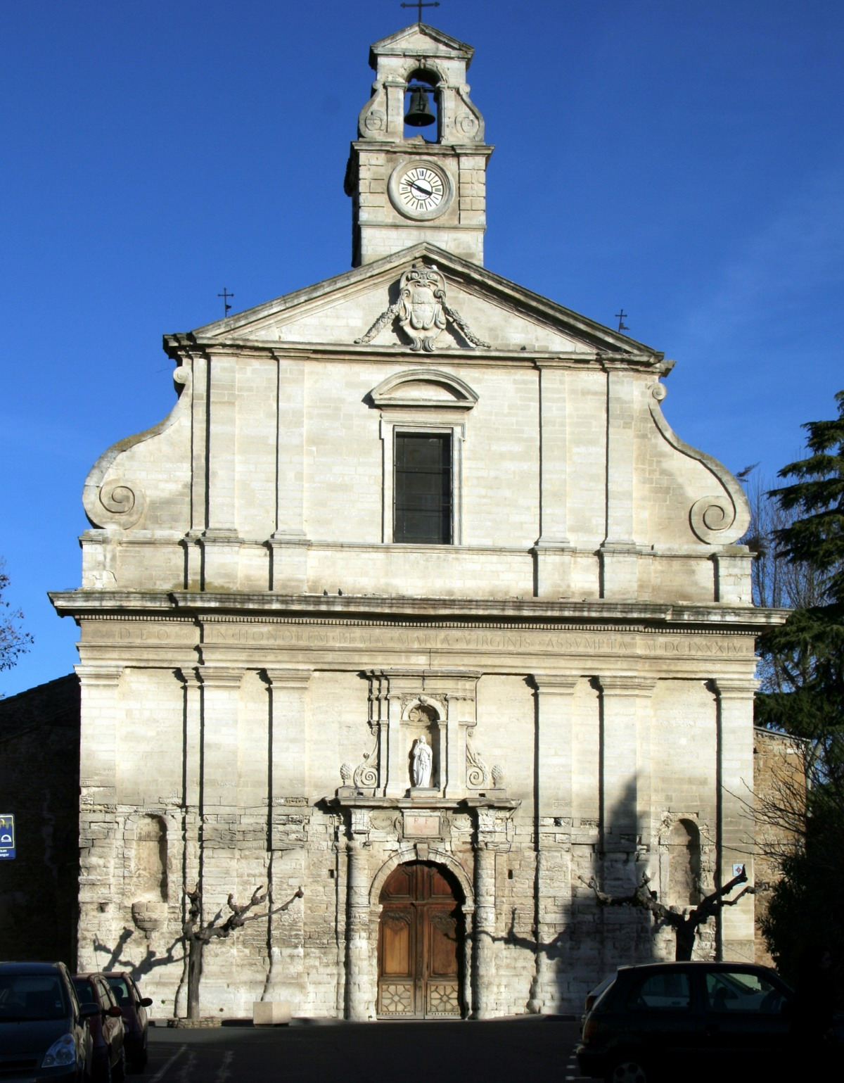 Eglise de Bédarrides, façade